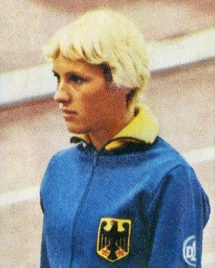 SPORT VEDETTES-PANINI 1974-Figurina n.14- FALCK - BRD -ATLETICA LEGGERA-Rec